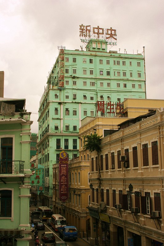 Hotel Central Macau